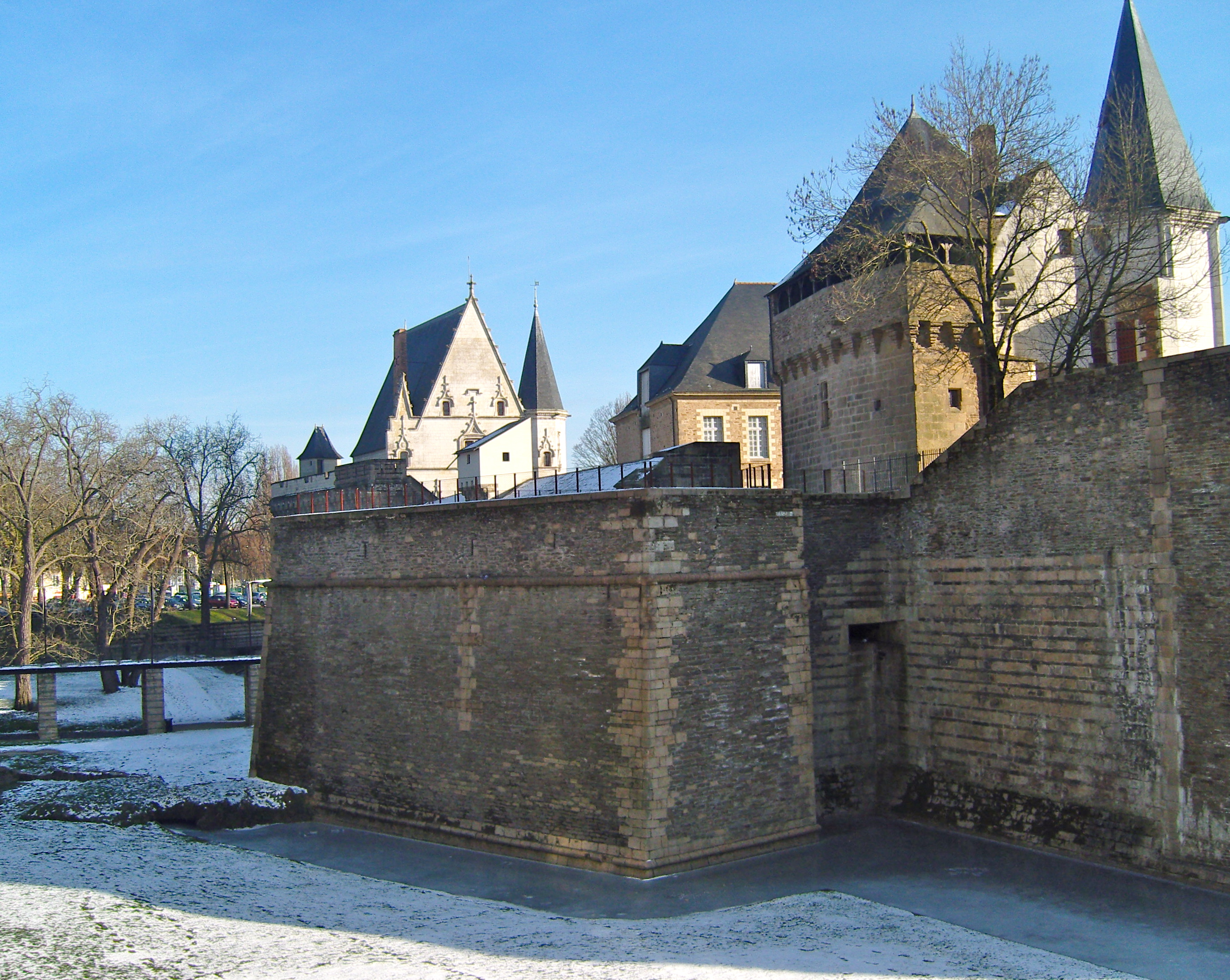 Château des ducs de Bretagne